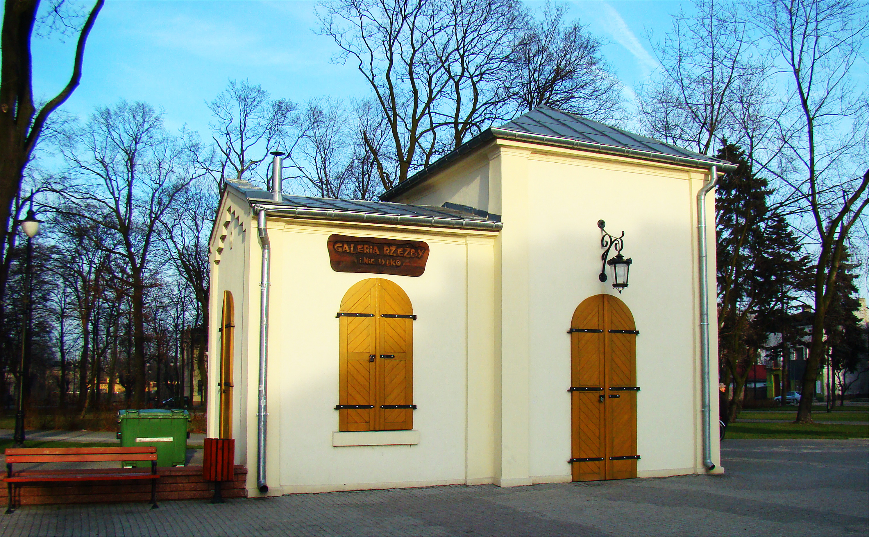 Budynek daw. Wagi Miejskiej w Aleksandrowie Łódzkim (powiat zgierski, województwo łódzkie), Polska